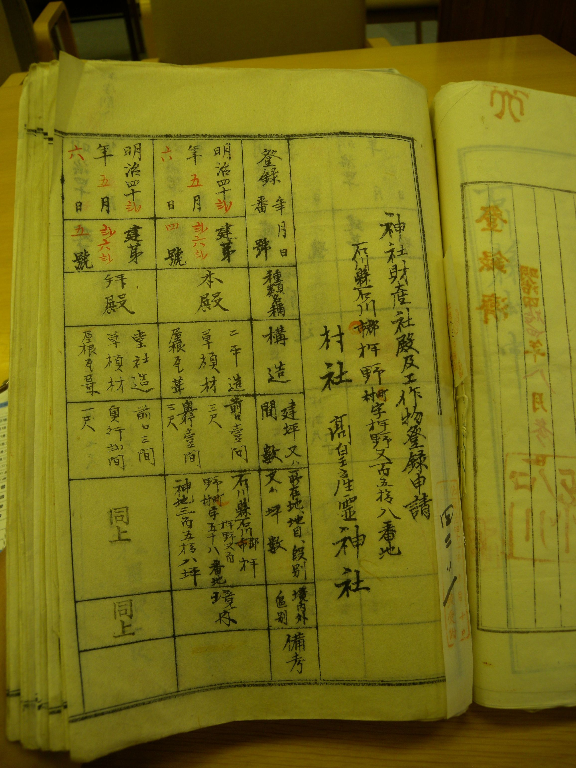 西部の多聞天社の明治末期登録書